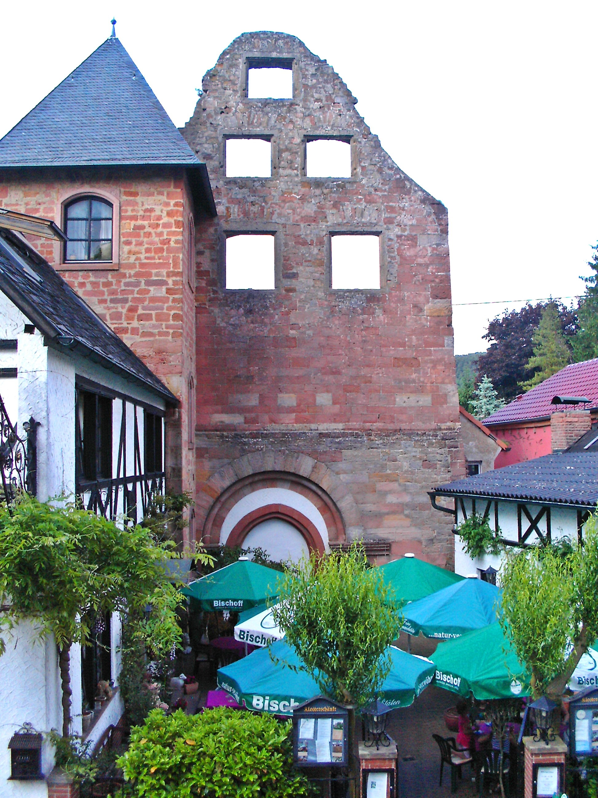 Kloster Höningen, Pfalz, Klosterkirche, Westfassade mit Hauptportal